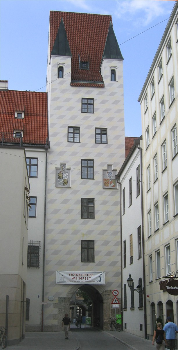 Alter Hof, München